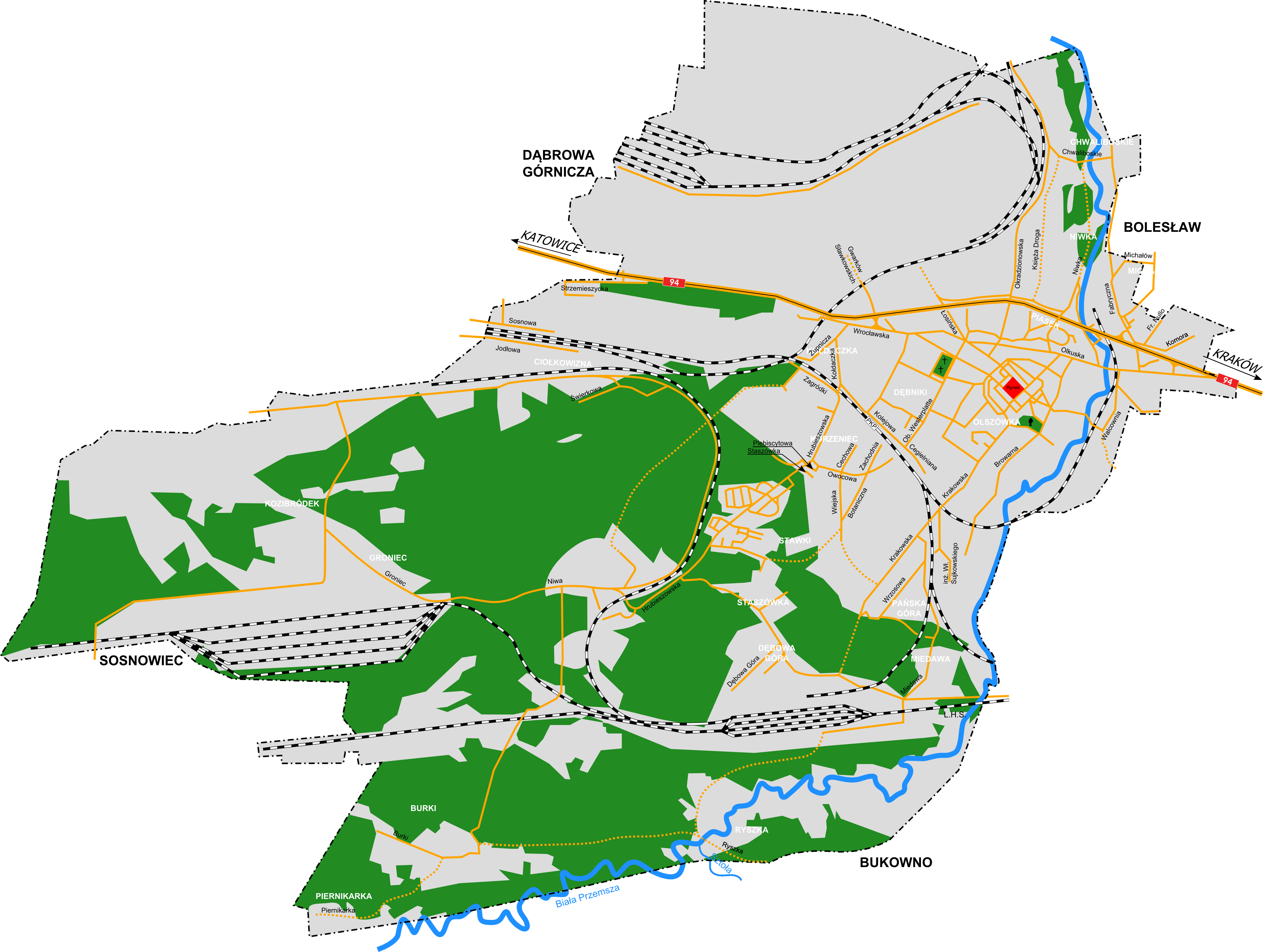 Mapa miasta Sławków (woj. śląskie)